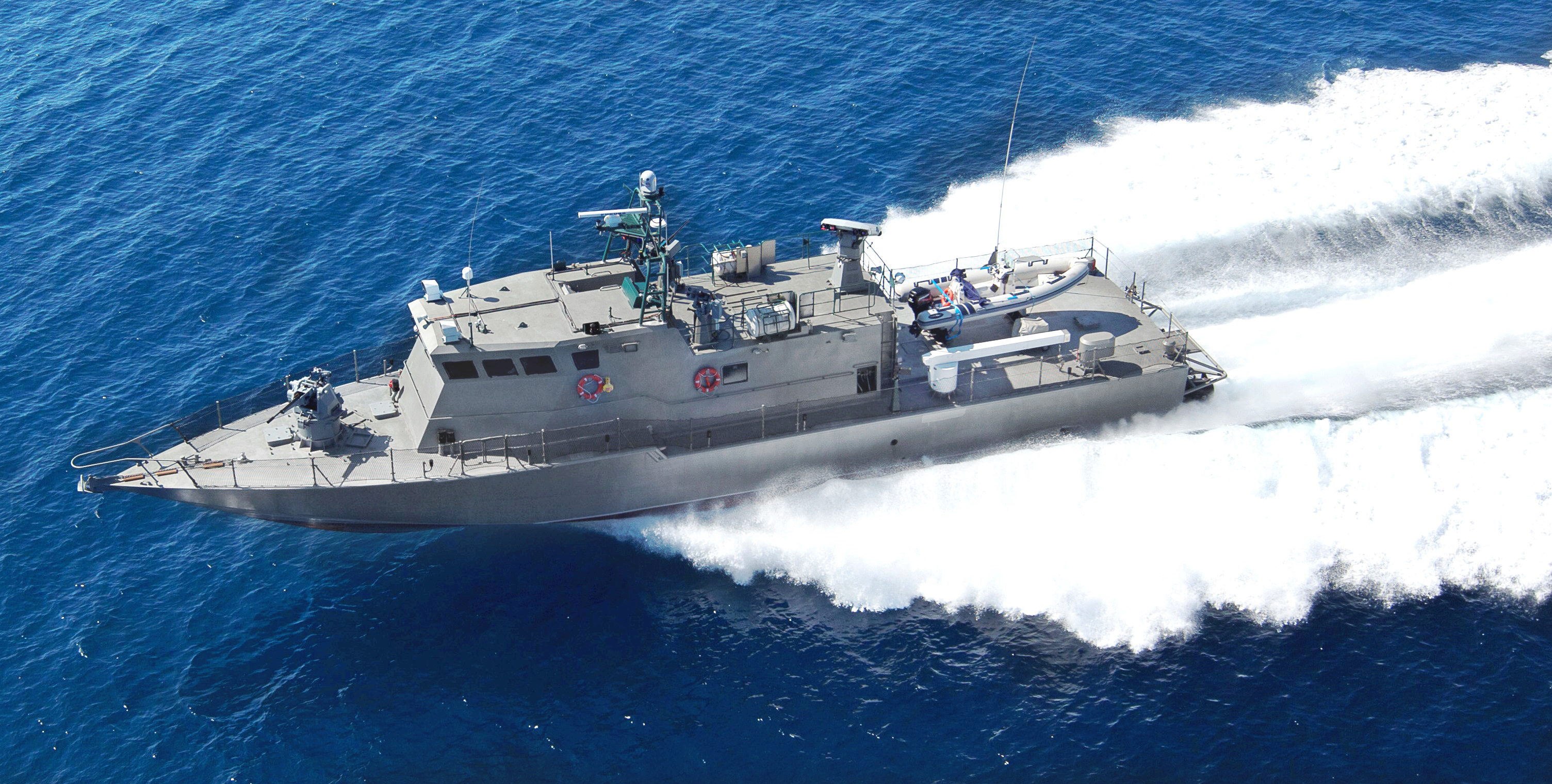 ספינה לבטחון שוטף מסדרת שלדג סימן מתוצרת מספנות ישראל